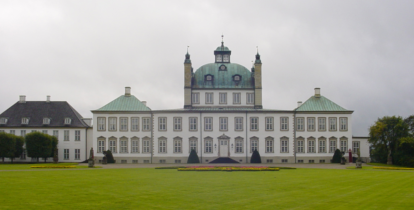 DENEMARK FREDENSBORG Това е едно от действащите "жилища" на кралското семейство.